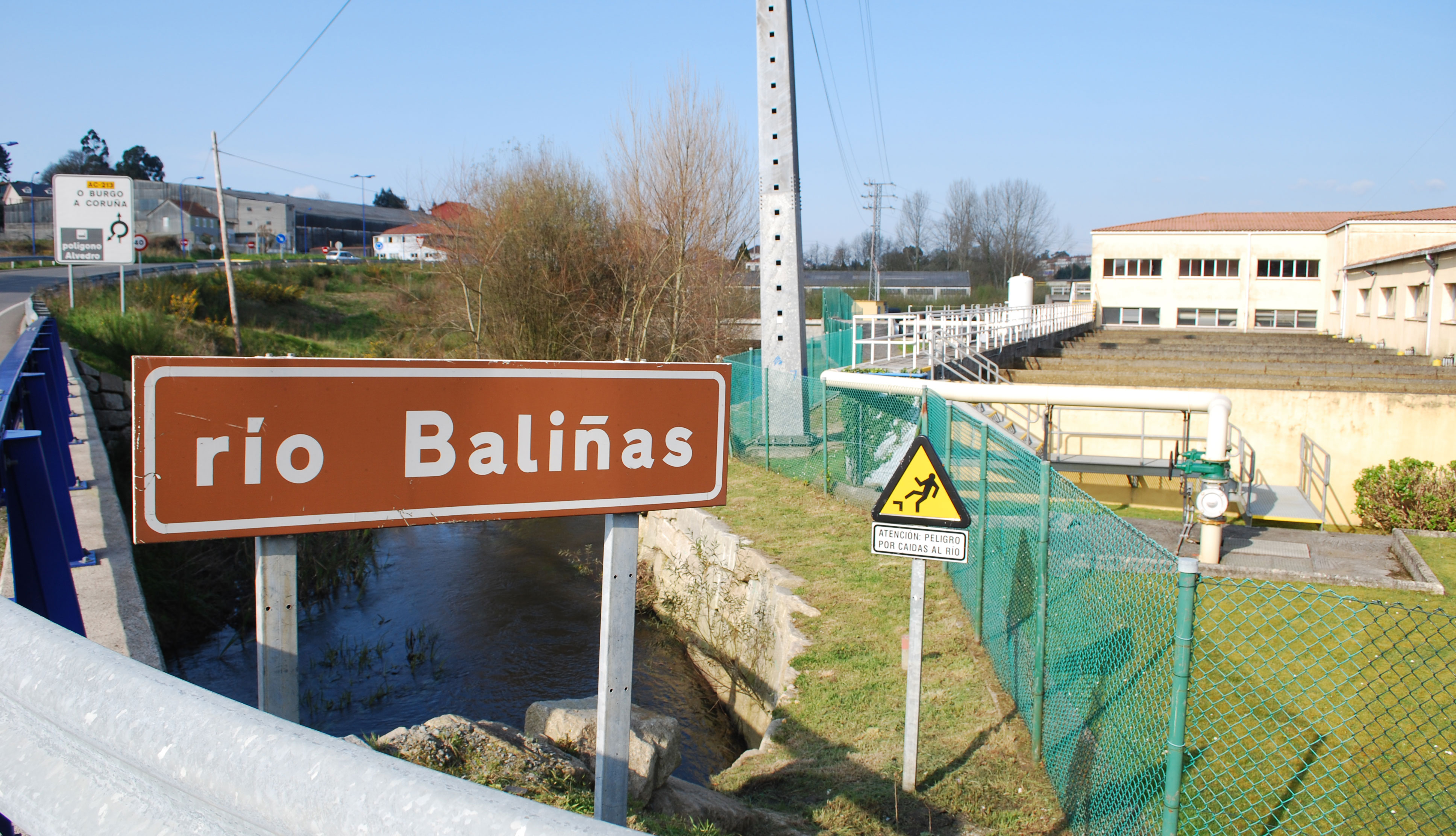 Río Baliñas na Telva, Culleredo, A Coruña, Galiza, Spain